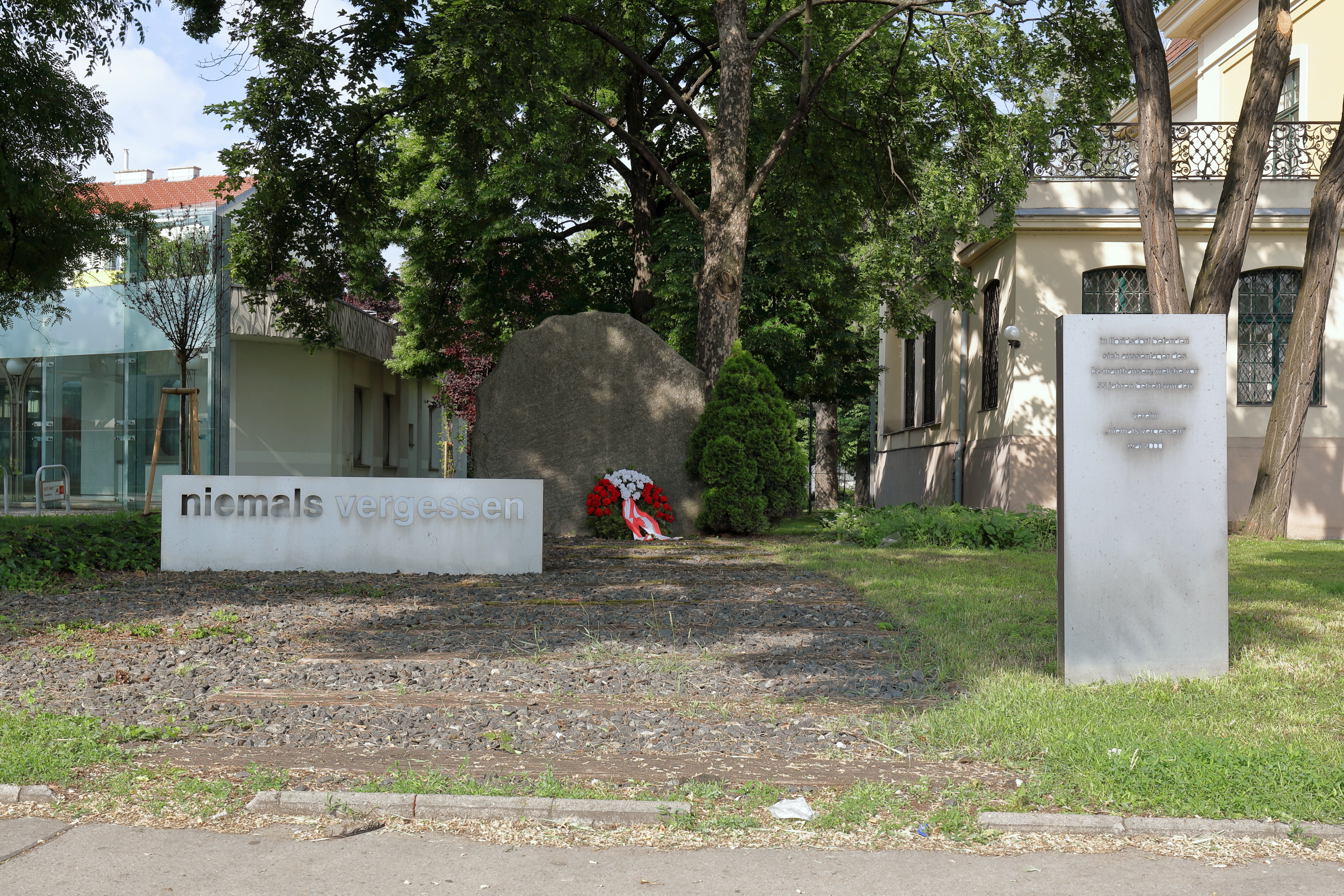 Das Denkmal Befreiung Außenlager des KZ Mauthausen in Floridsdorf an der Adresse der Prager Straße 33 im 21. Wiener Gemeindebezirk Floridsdorf. Das Denkmal beim Bezirksmuseum Floridsdorf wurde im Jahr 2000 vom Verein niemals vergessen errichtet und soll an die Befreiung von 2 Außenlager des KZ Mauthausen erinnern.